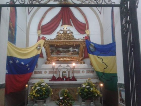 Urna Barroca donde reposan los restos del Mártir San Celestino, Patrono de Barcelona,Anzoategui,Venezuela